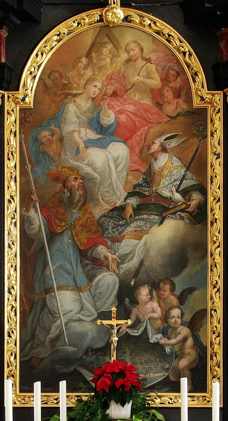 St. Hilarius